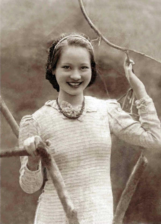 Cô Hòa-Vân (ái-nữ của học-giả Nguyễn-văn-Vĩnh) trong bộ y-phục tân-thời mùa thu của Lemur, 1938. Ngày-Nay tuần-báo 1938.